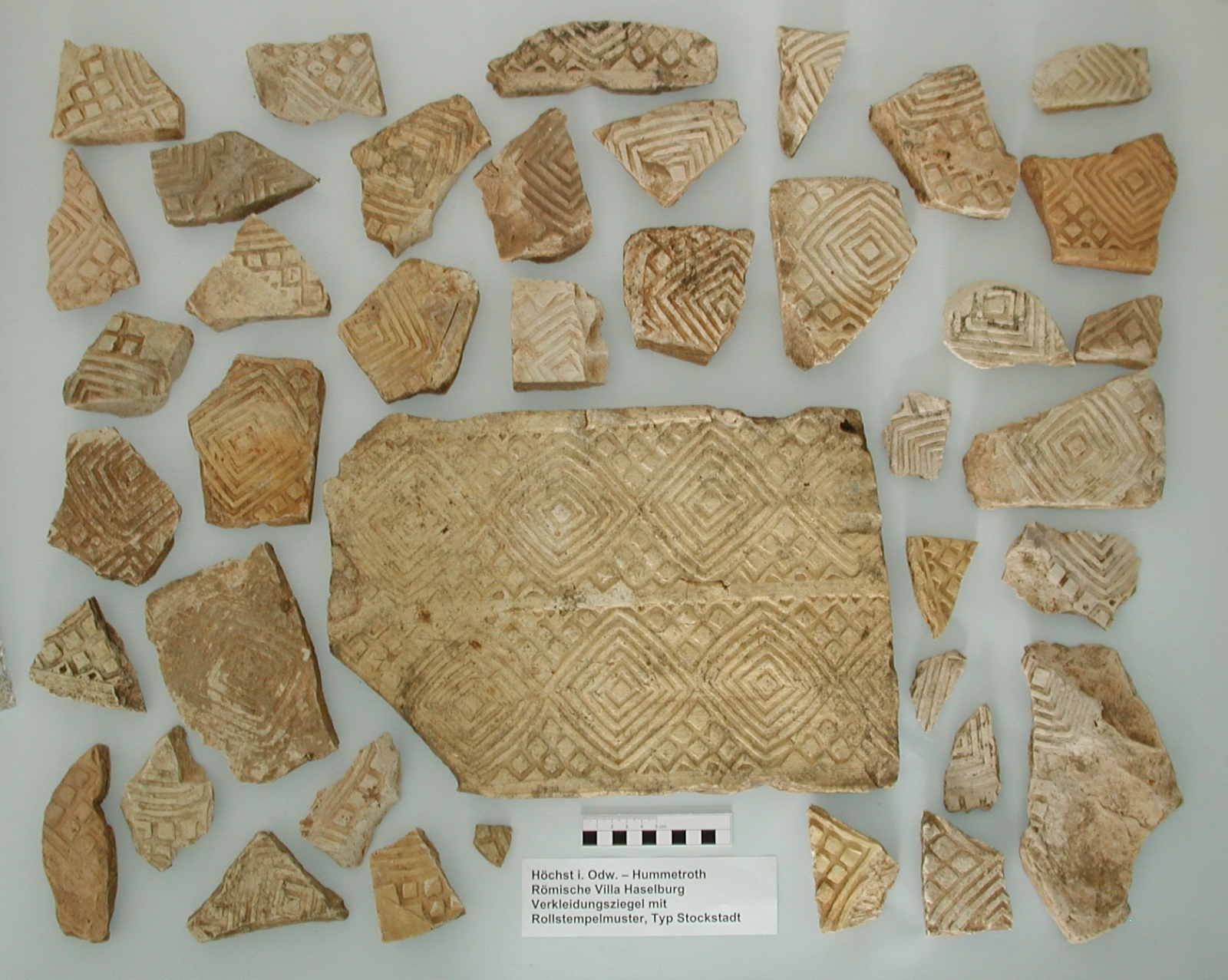 Römische Villa Haselburg im Odenwald, Hessen, Verkleidungsziegel vom Typ "Stockstadt". Literatur: D. Baatz: Verkleidungsziegel mit Rollstempelmustern aus Südhessen. In: Saalburg-Jahrbuch 44, 1988 S. 65-83.